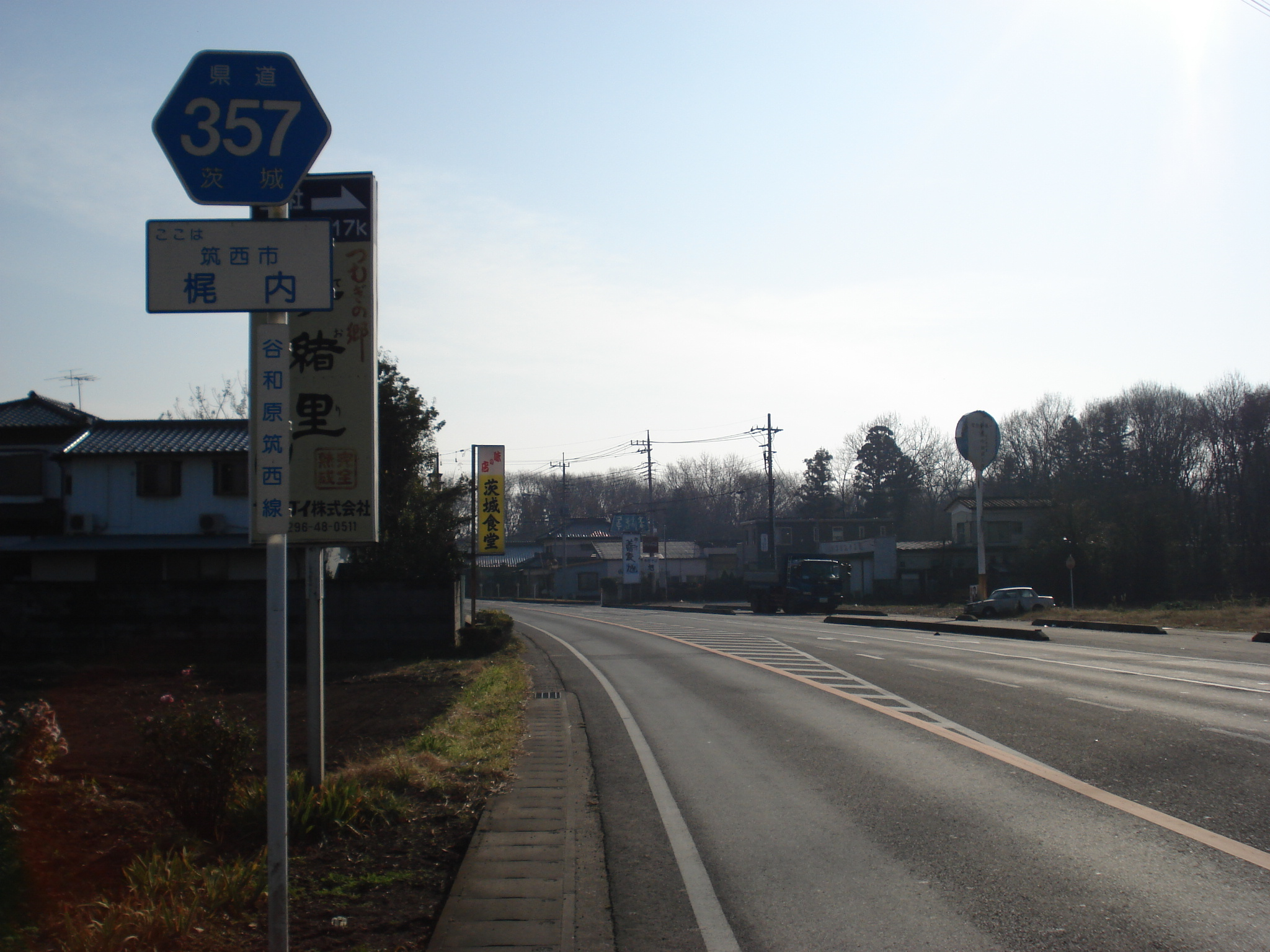 茨城県道357号谷和原筑西線 茨城県筑西市梶内